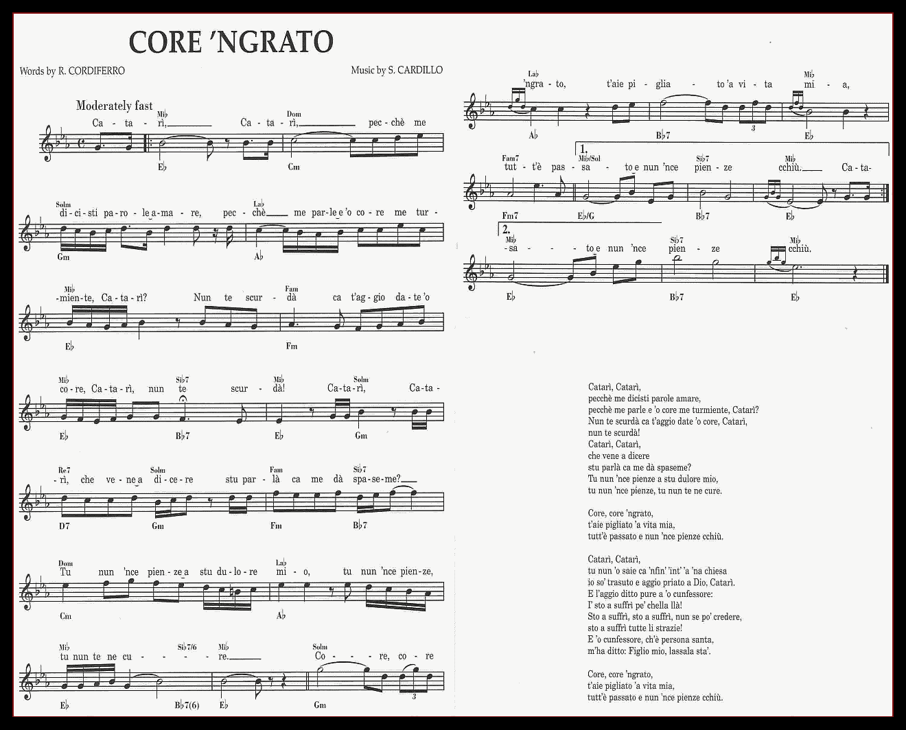 Partitura de Core 'ngrato